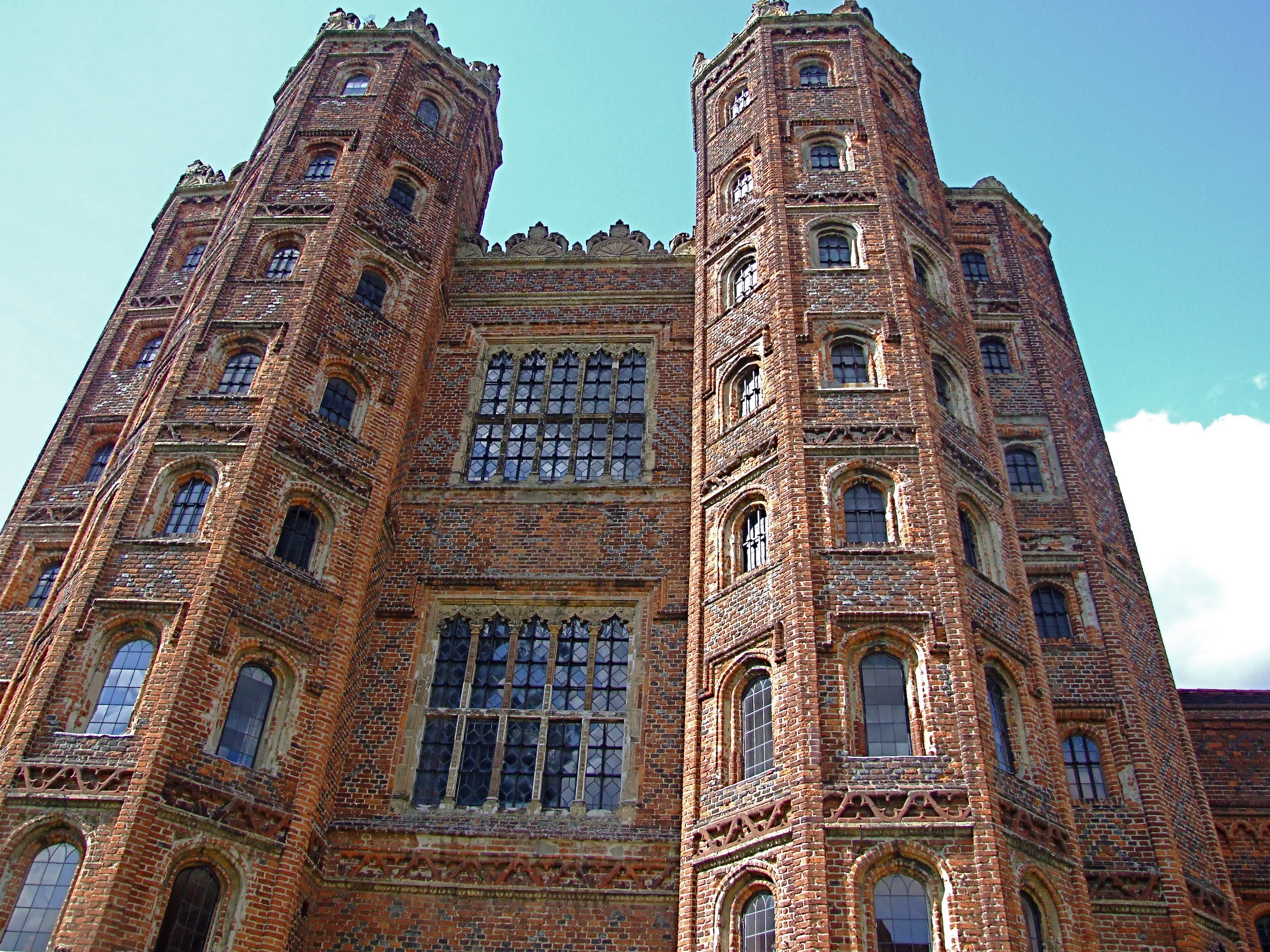 Layer Marney